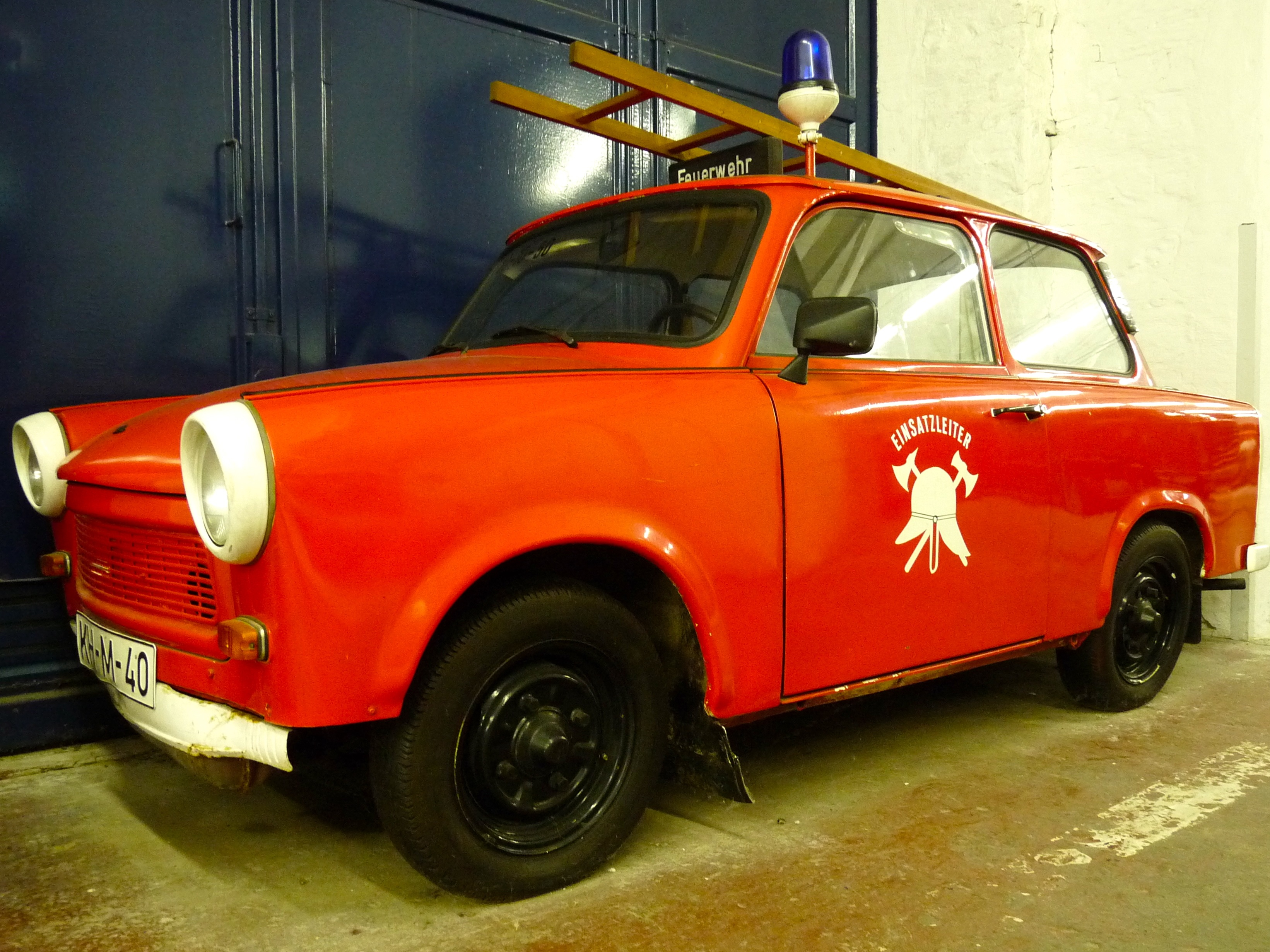 Trabant als Fahrzeug des Feuerwehreinsatzleiters im Technikmuseum Prora.